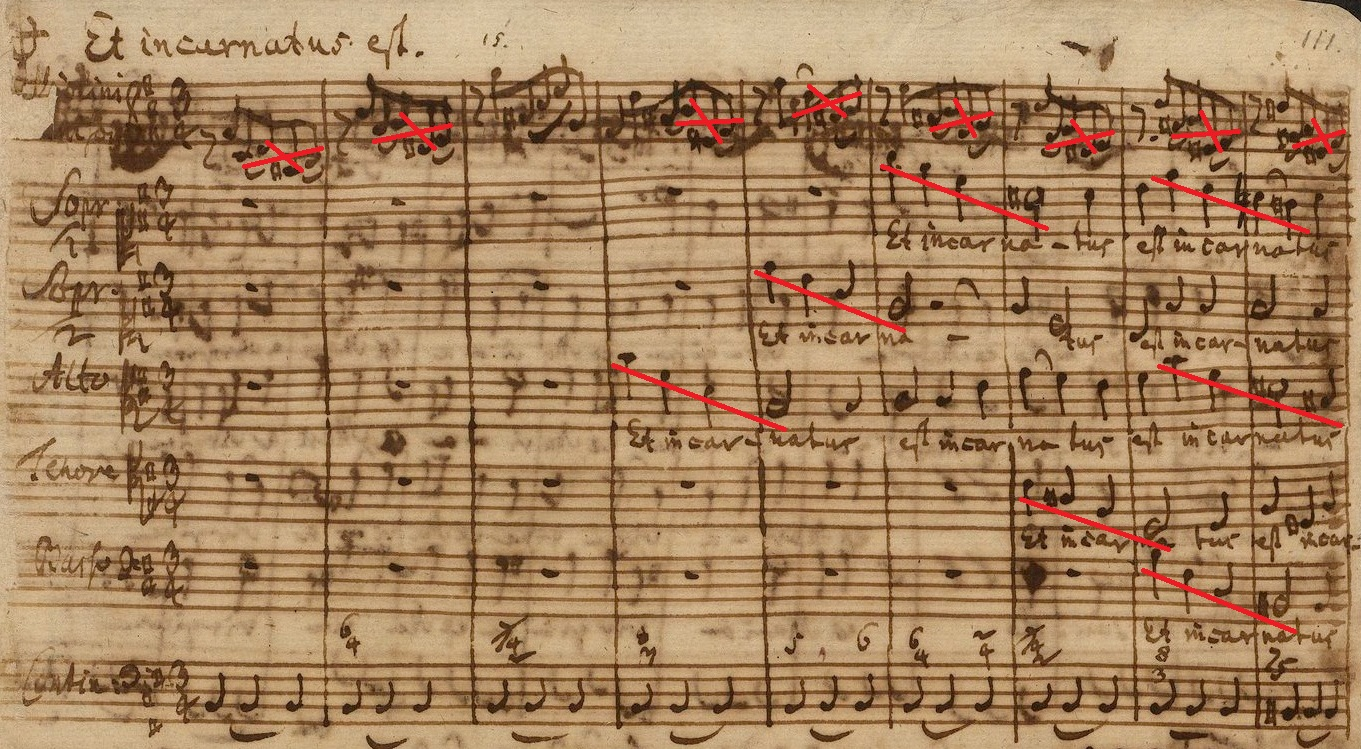 Johann Sebastian Bach, Messe in h-Moll BWV 232, Autograph des Et incarnatus est Nr. aus dem Credo mit grafischen Zeichen